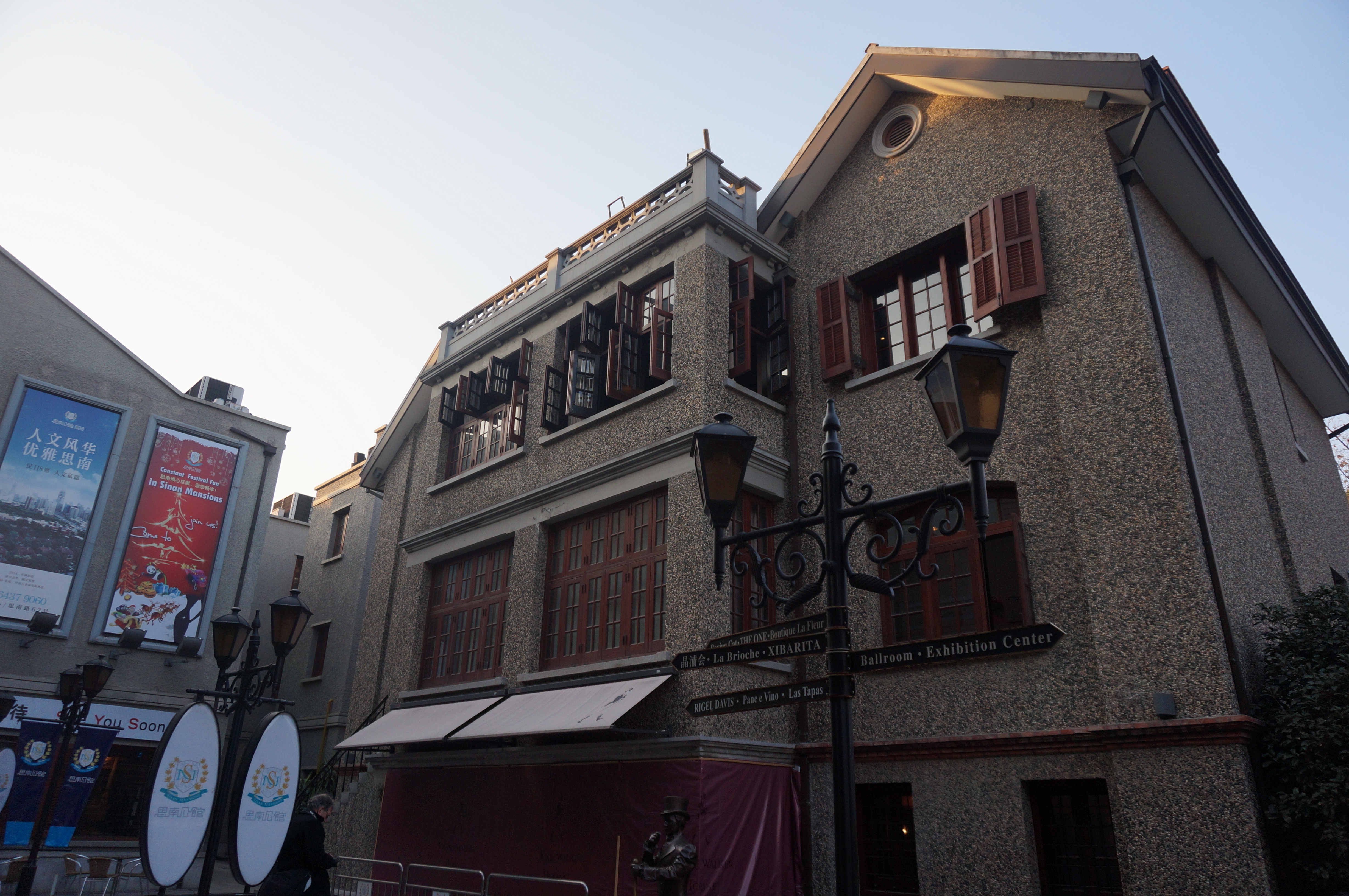 上海思南公馆